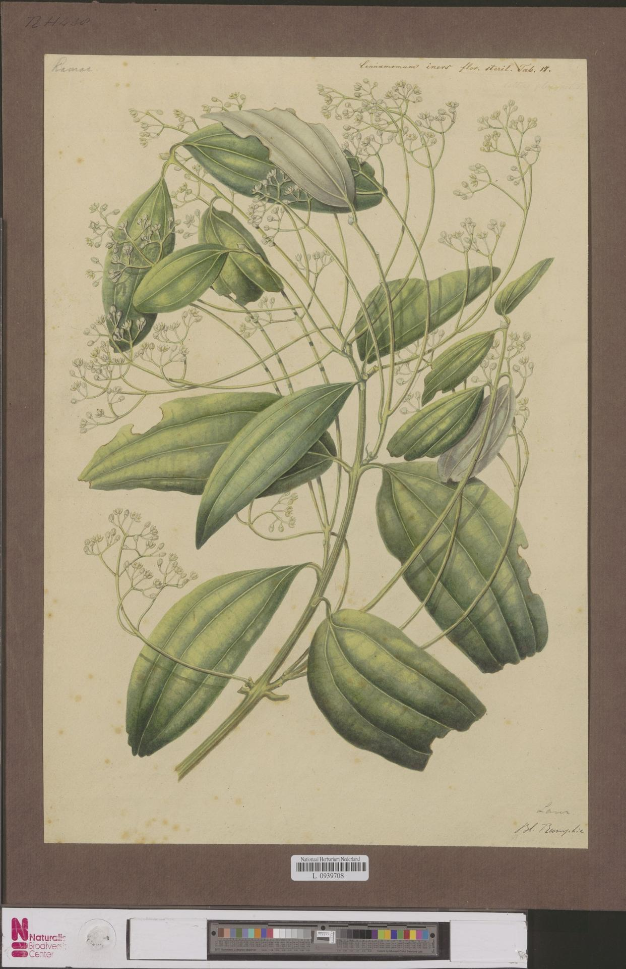 Cinnamomum iners Reinwardt. ex Blume, C.Linnaeus